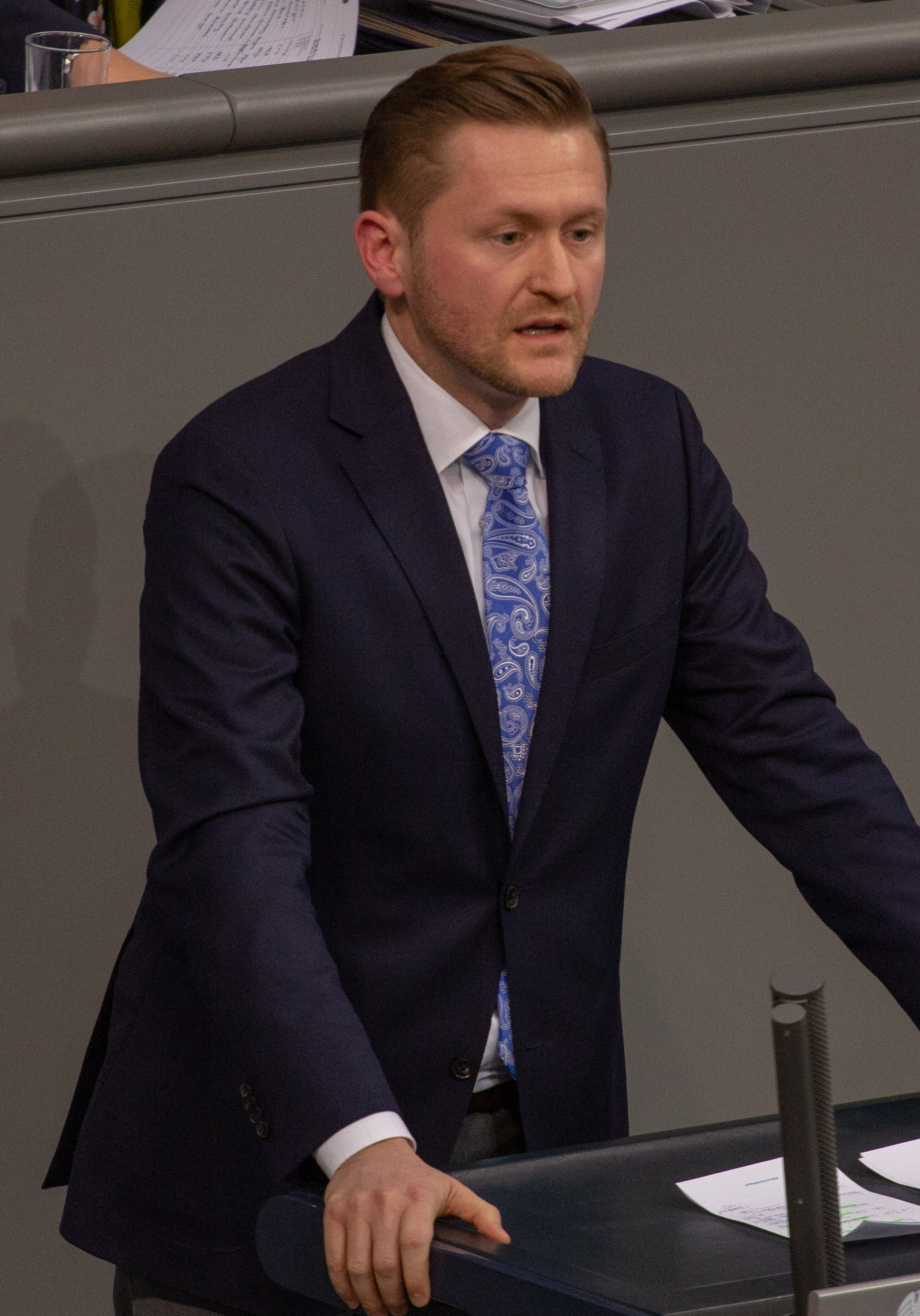 Wolfgang Stefinger, Mitglied des Deutschen Bundestages, während einer Plenarsitzung am 11. April 2019 in Berlin.